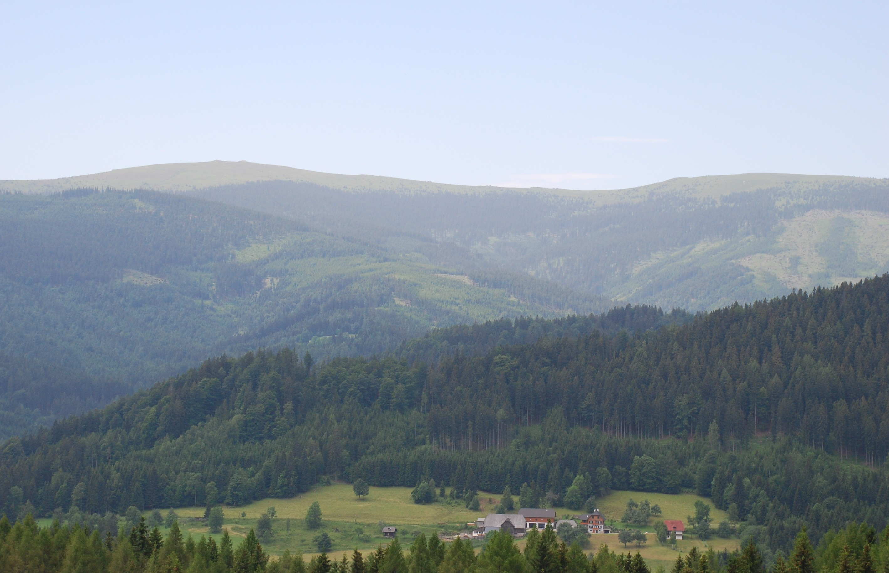 Quellgebiet der Laßnitz: Handalm und Weberkogel (re.) im Hintergrund, links mitte Poschkogel, Vordergrund Pöschlkogel und Rettenbachtal